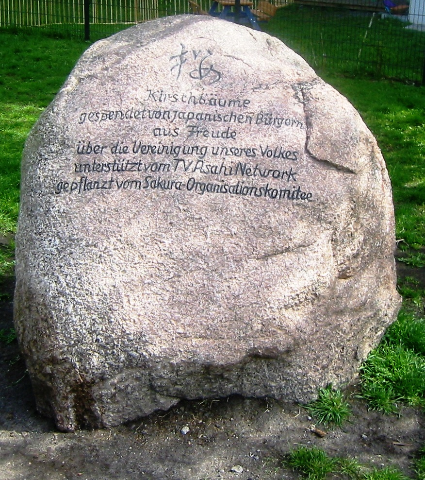 Gedenkstein für die Aktion "Sakura-Campaign" an der Lohmühlenbrücke in Alt-Treptow in Berlin